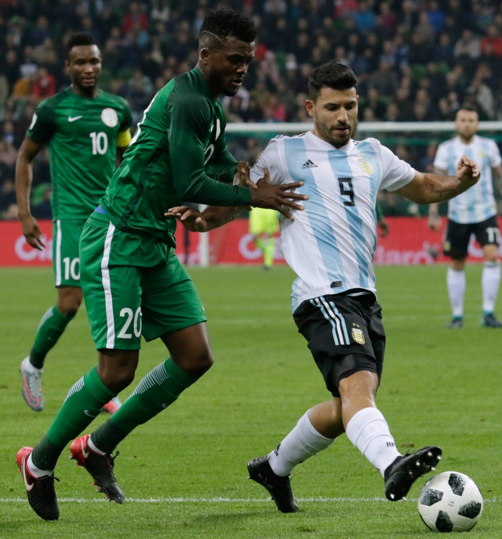 Chidozie Awaziem, Sergio Agüero